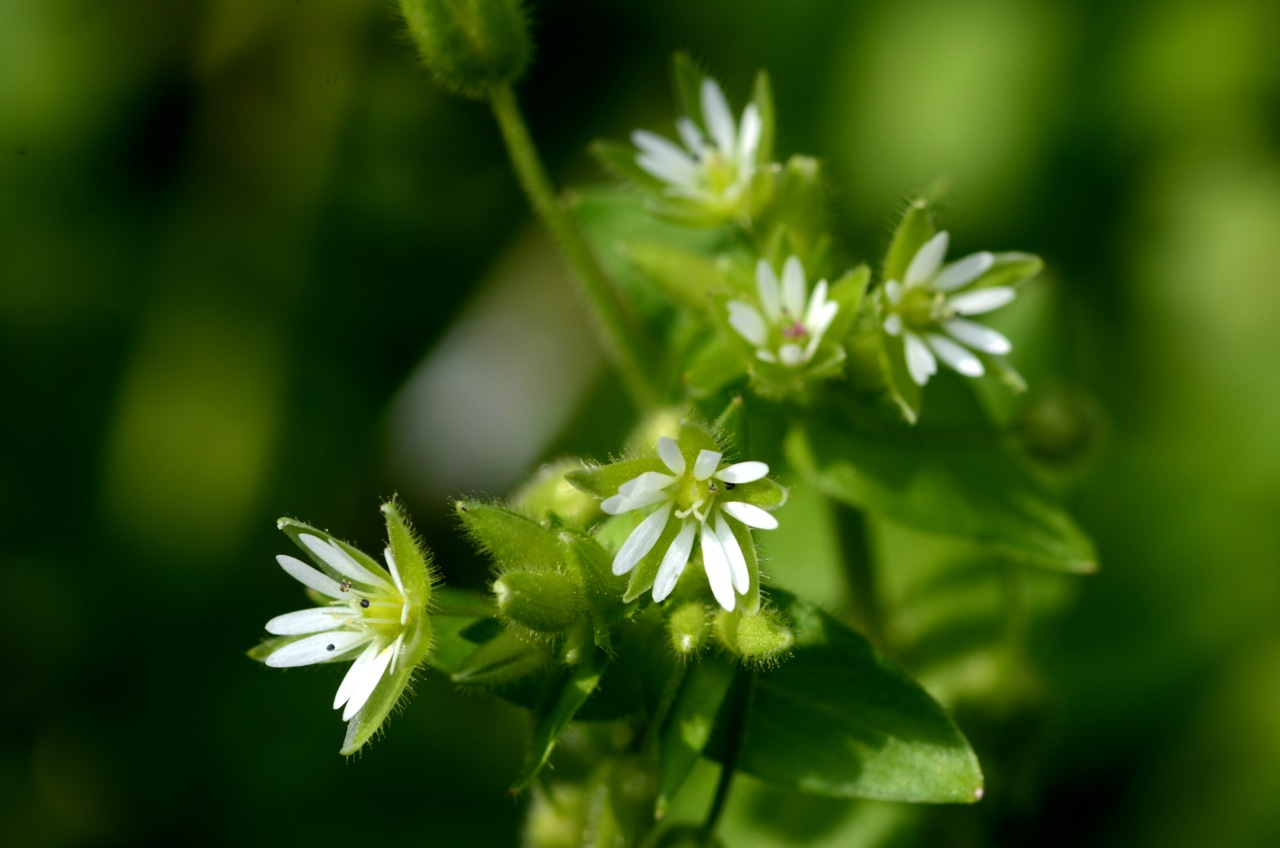 Stellaria media